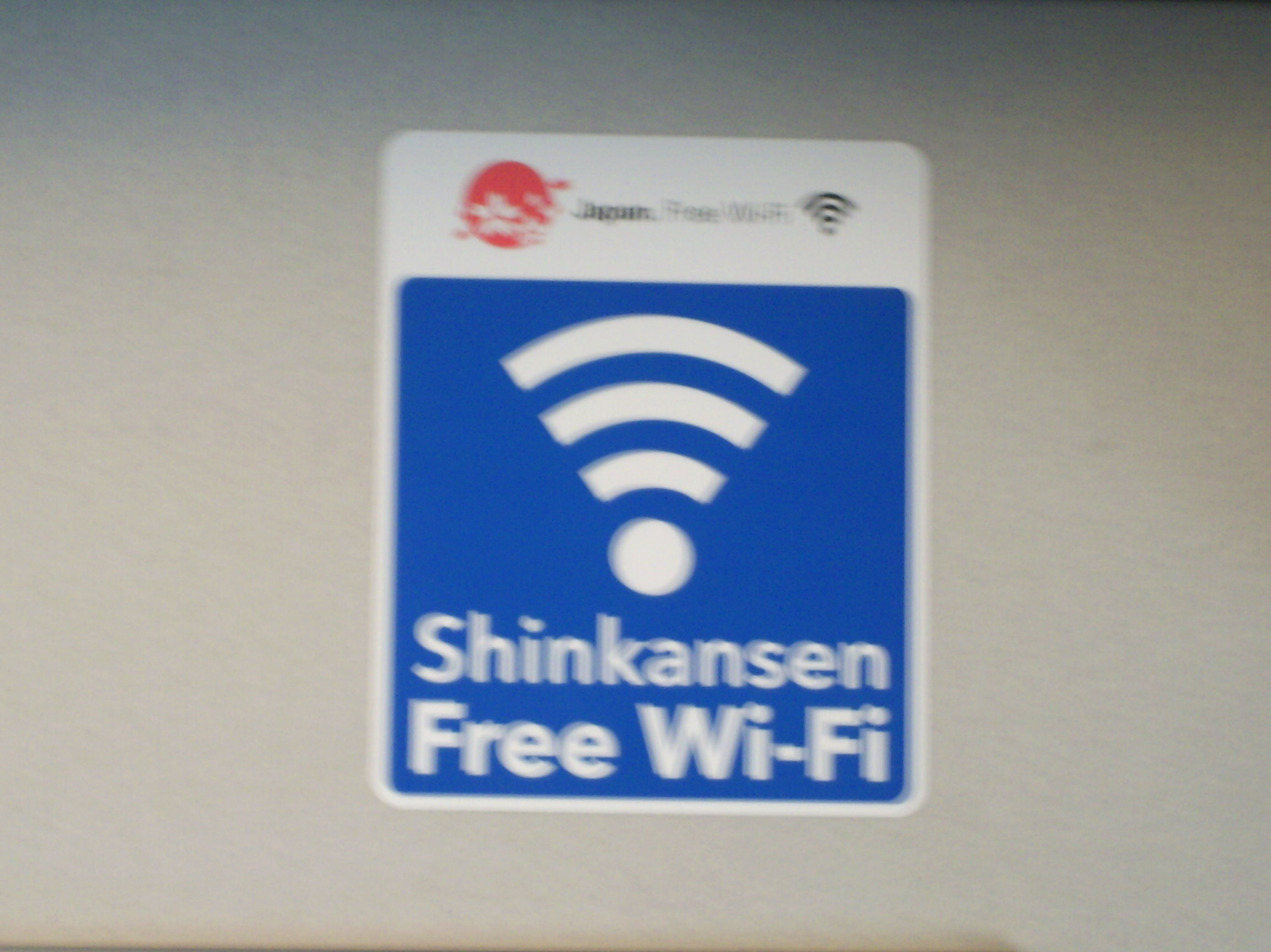 東海道新幹線車内のフリーWi-Fiサービス表示 ㊟カメラを起動すると日付機能が出荷時のものに初期化されるため、ファイル履歴の投稿日時とメタデータの原画像データの生成日時が異なります（本概要欄の下記日付が撮影日）